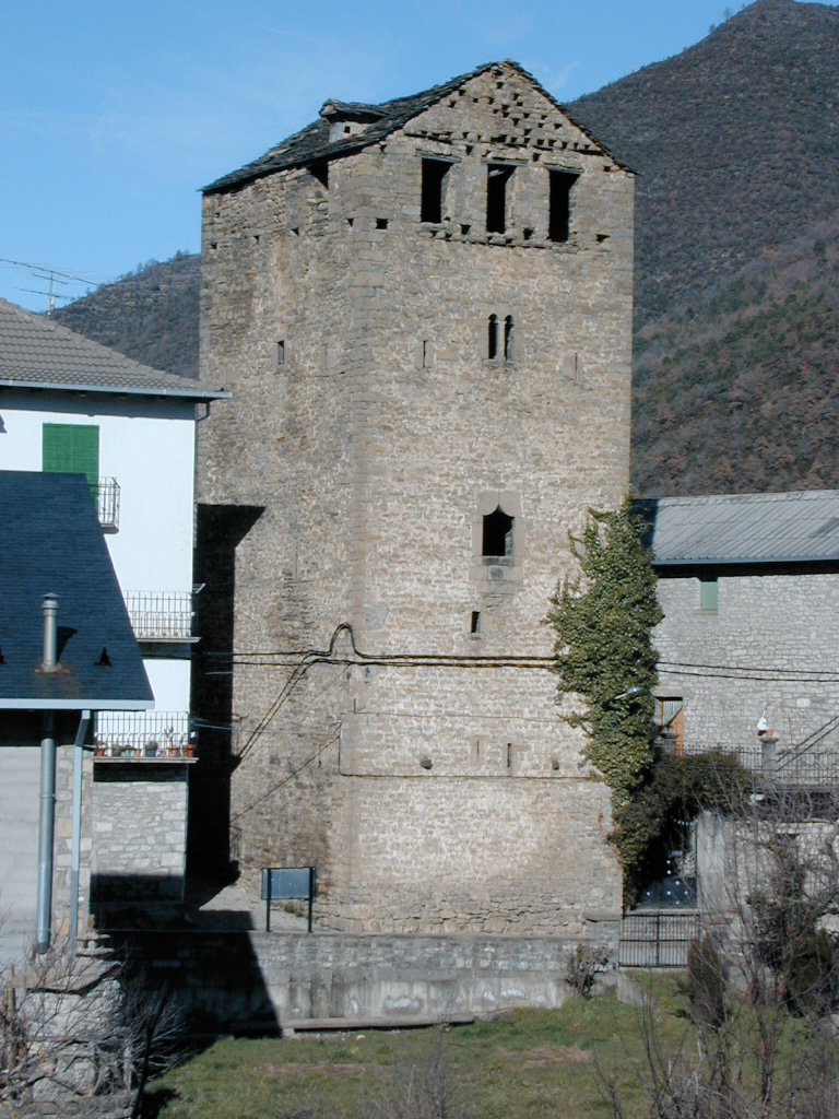 Torre de Casa Antoné